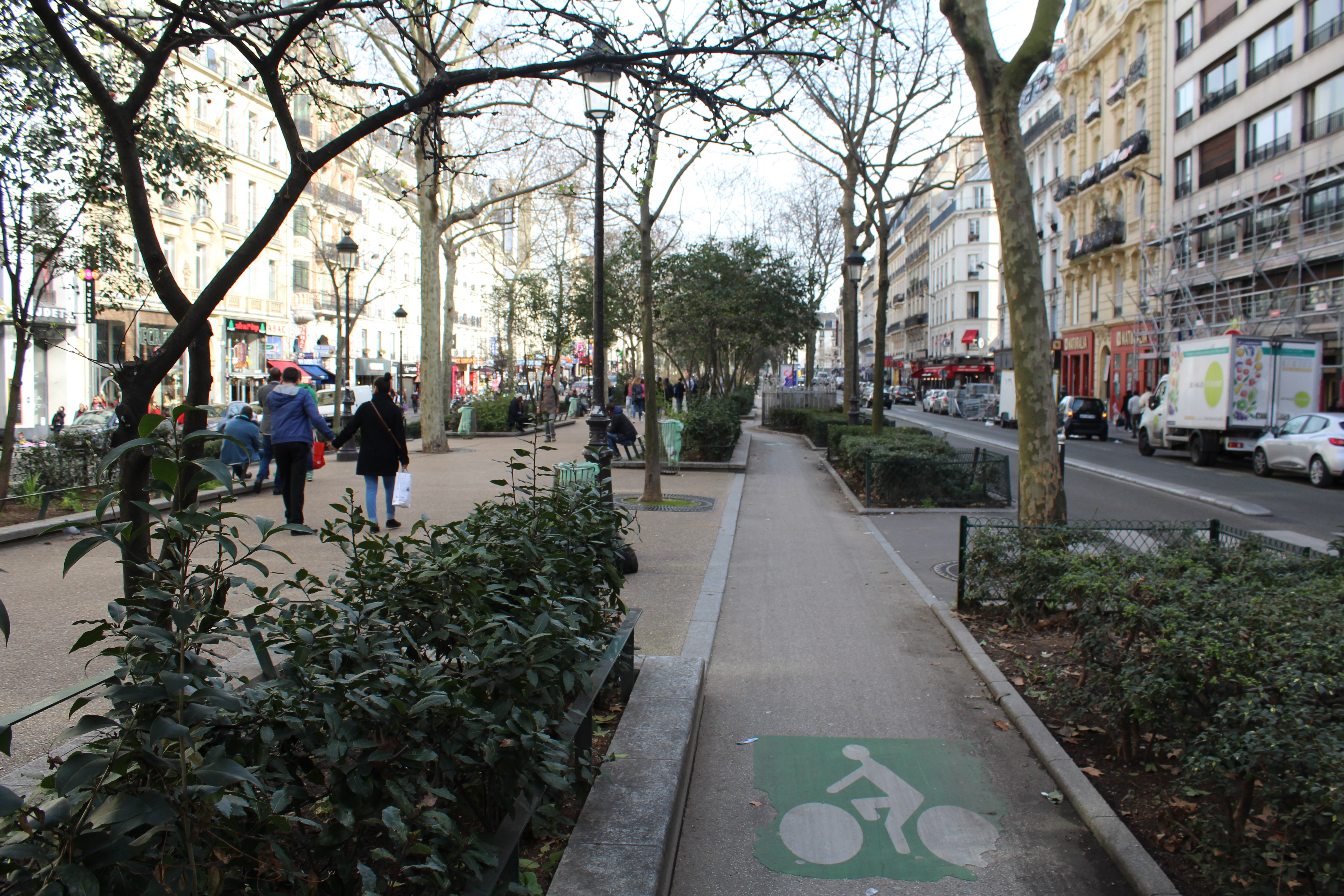 Voie cyclable sur la promenade Jacques Canetti à Paris.